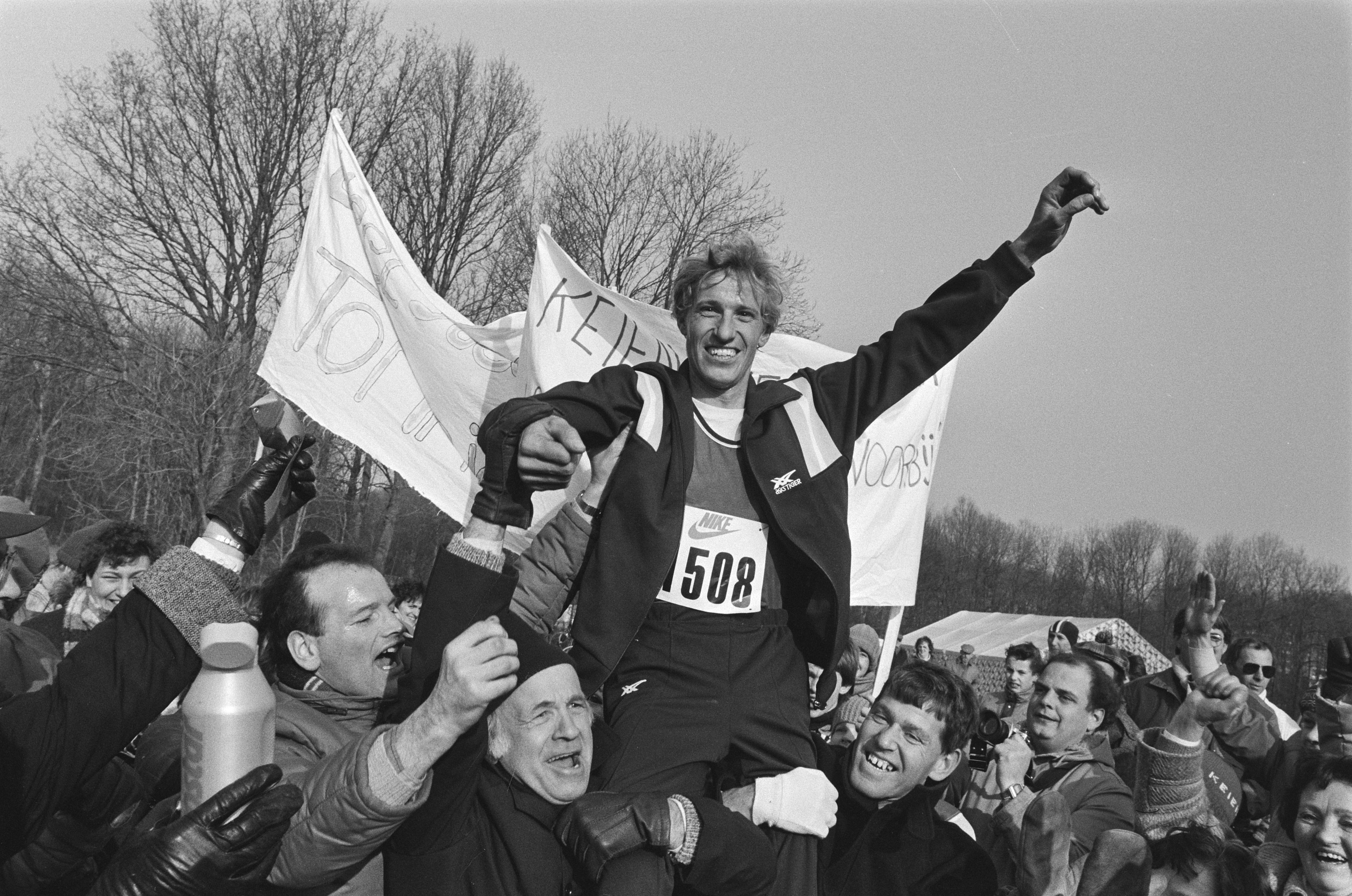 Collectie / Archief : Fotocollectie Anefo Reportage / Serie : Nederlandse Veldloopkampioenschappen in Amsterdamse bos Beschrijving : Tonnie Dirks bij fans op de schouders Datum : 2 maart 1986 Locatie : Amsterdam, Noord-Holland Trefwoorden : spandoeken, supporters, veldlopen Persoonsnaam : Dirks, Tonnie Fotograaf : Bogaerts, Rob / Anefo, [onbekend] Auteursrechthebbende : Nationaal Archief Materiaalsoort : Negatief (zwart/wit) Nummer archiefinventaris : bekijk toegang 2.24.01.05 Bestanddeelnummer : 933-5813